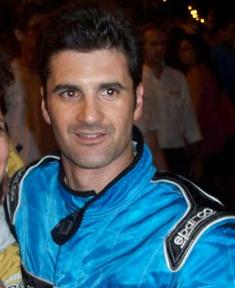 Emiliano Spataro, piloto bicampeón de TRV6 y campeón de Super Turismo Sudamericnao